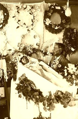 Angelito